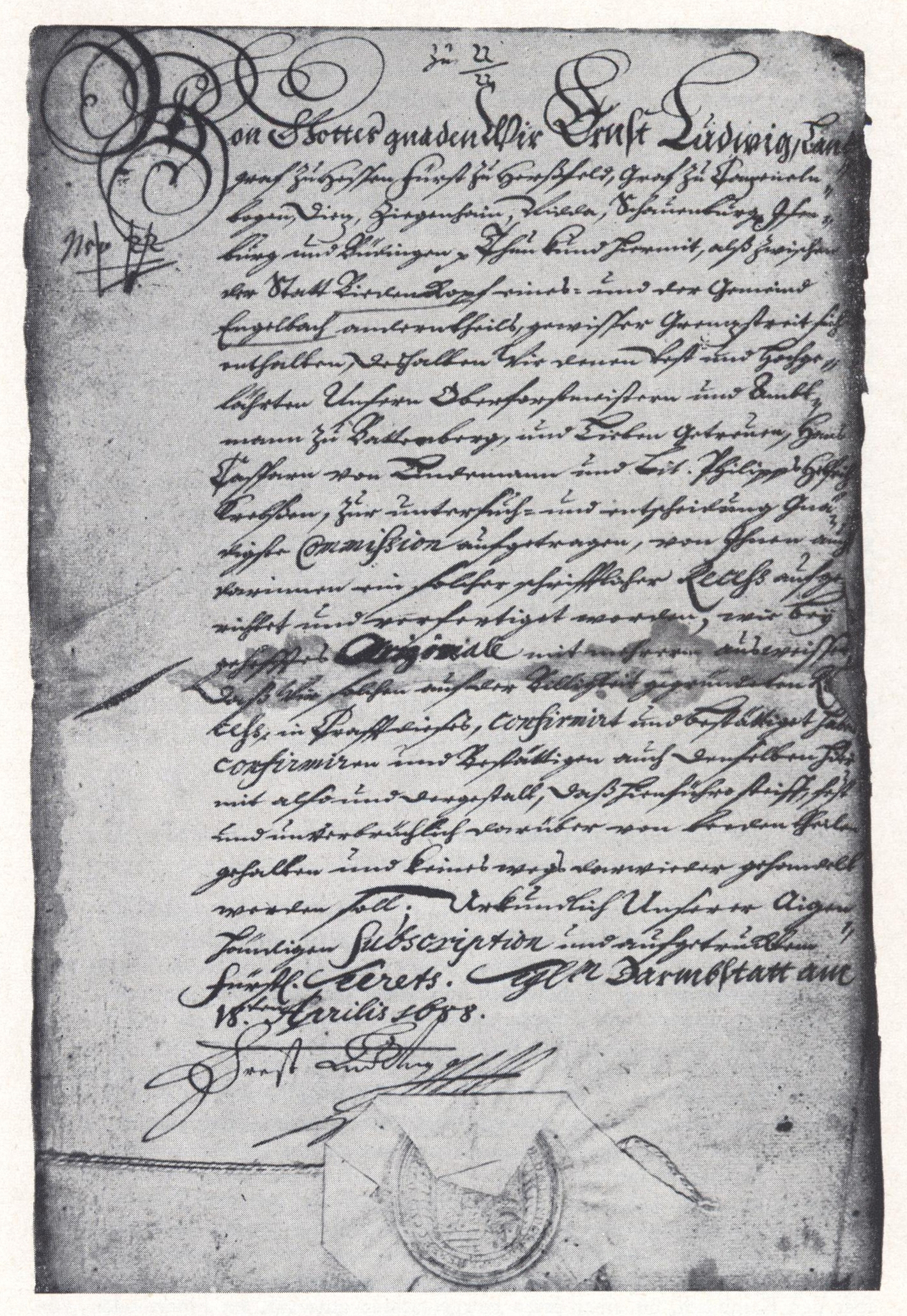 Biedenkopf, Hessen, Deutschland: Urkunde über eine Beilegung von Grenzstreitigkeiten zwischen den Orten Engelbach und Biedenkopf; unterzeichnet von Landgraf Ernst Ludwig von Hessen.